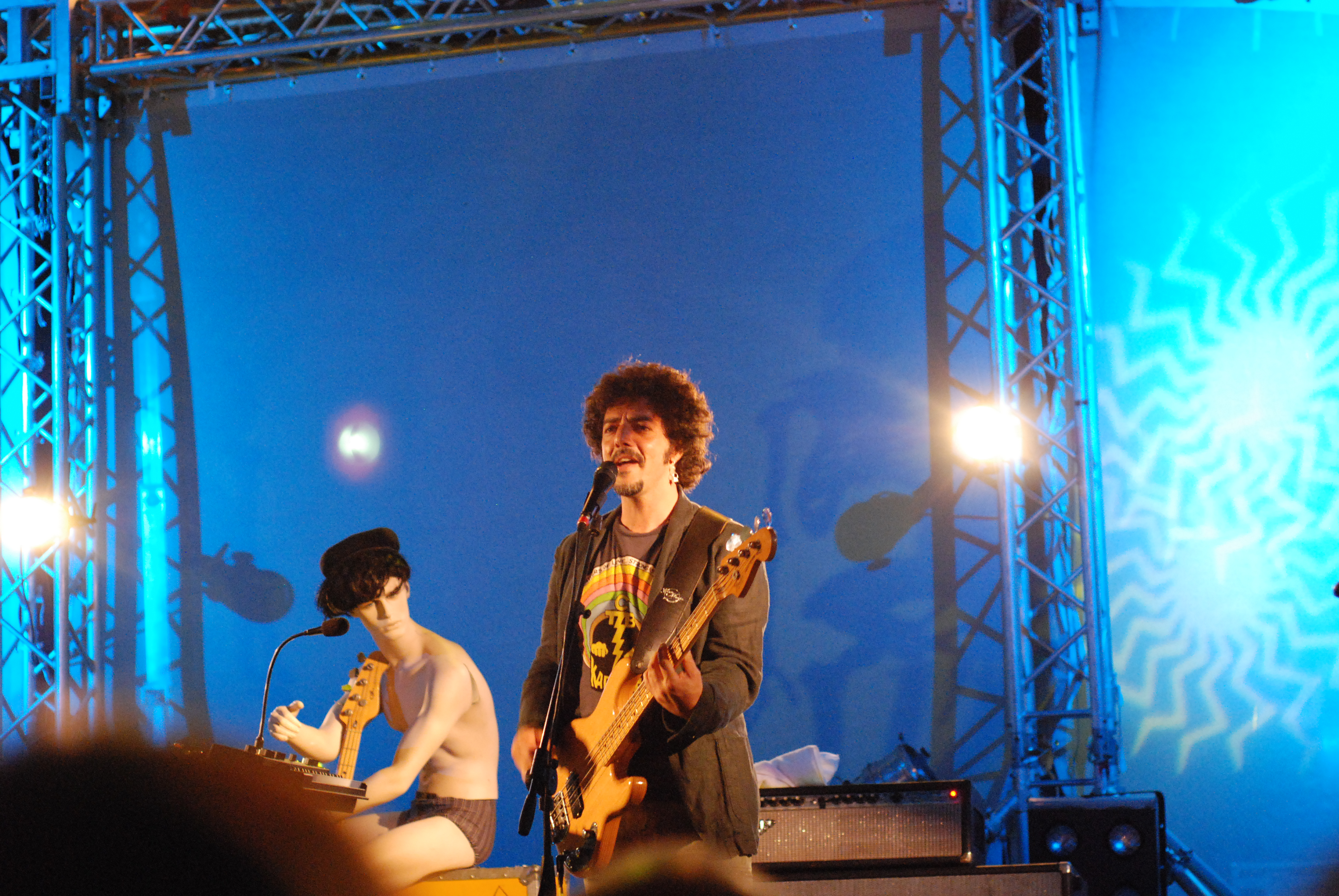 Max Gazzé, Basilicata, 2010.